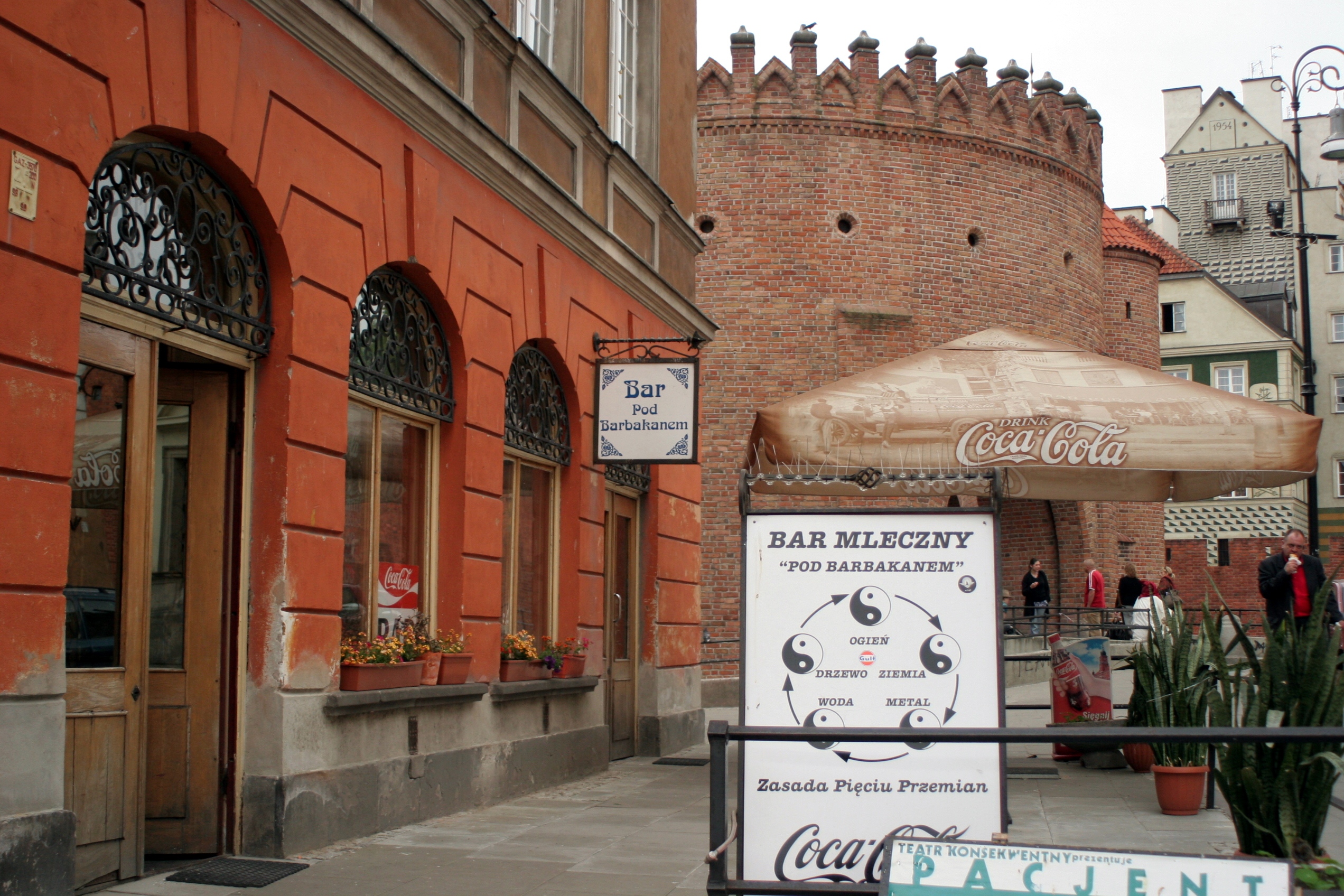 Bar Mleczny, Milkbar. Restaurante típico da época comunista.